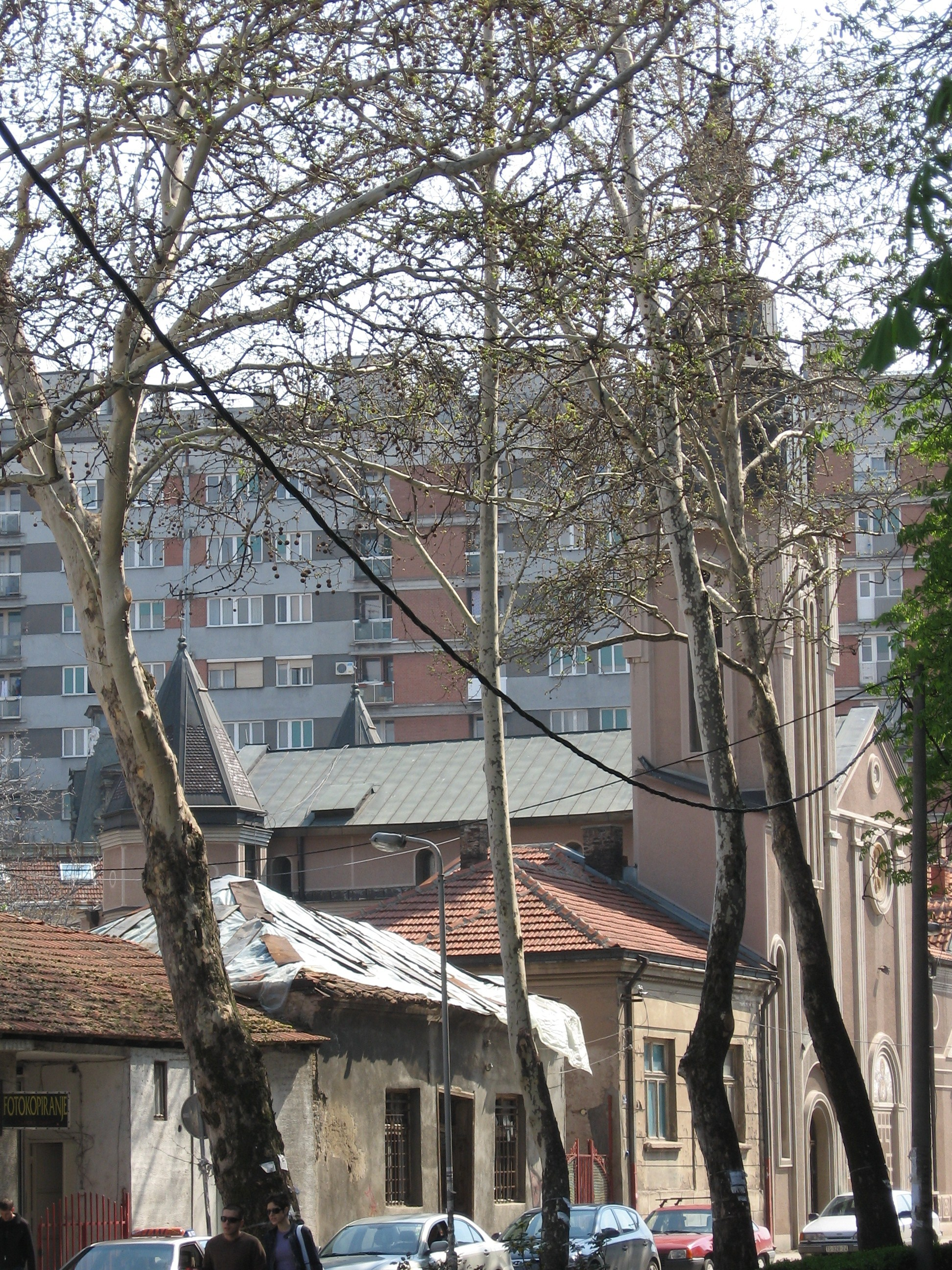 Слика цркве Пресветог срца Исусовог у Нишу. Снимљено у априлу 2010.